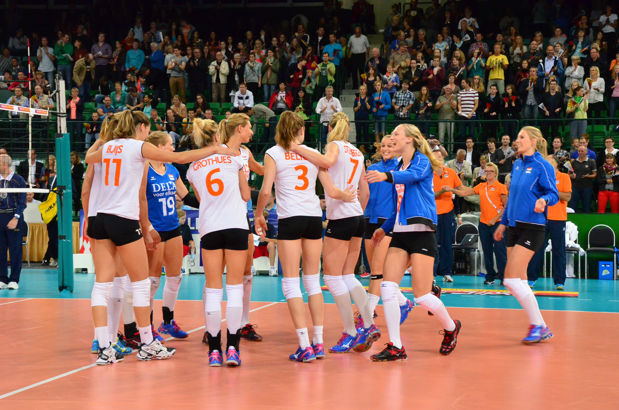 Volleyball-Europameisterschaft der Frauen 2013-Spielort Halle (Westf) Gerry-Weber-Stadion - Spiel 8. September 2013 (Spanien-Niederlande)